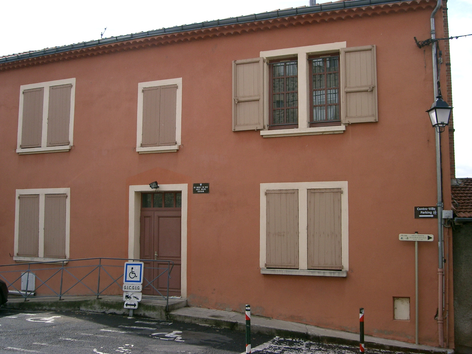 Geburtshaus von Jules Vallès in Le Puy en Velay - Frankreich